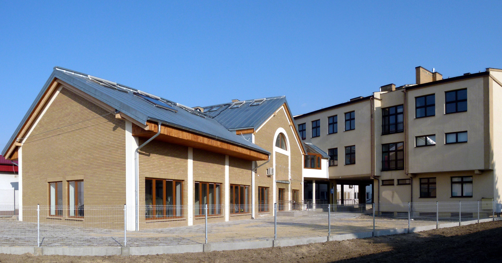 Laboratoria budownictwa Wyższej Szkoły Zarządzania i Administracji w Zamościu, ul. Sienkiewicza 22a, 22-400 Zamość